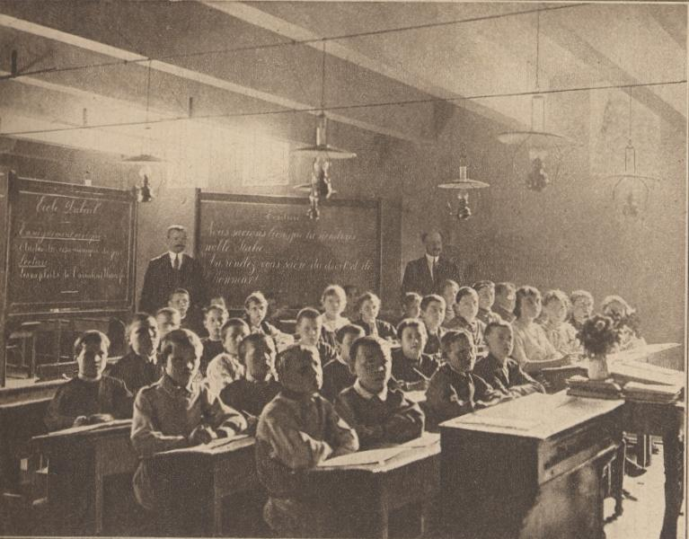 L'école Dubail dans les caves d'une maison de vins de Champagne, à 2 kilomètre des tranchées allemandes.